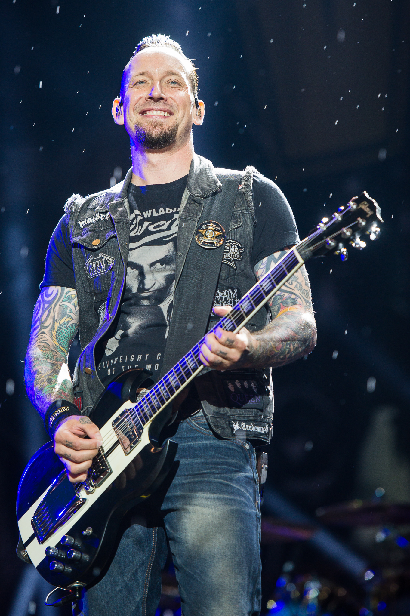 ARGO-Konzerte,Festival,Konzert,Livekonzert,Livemusik,Michael Schøn Poulsen,Musik,RiP,Rock im Park 2016,Seat Zeppelin Stage,Volbeat